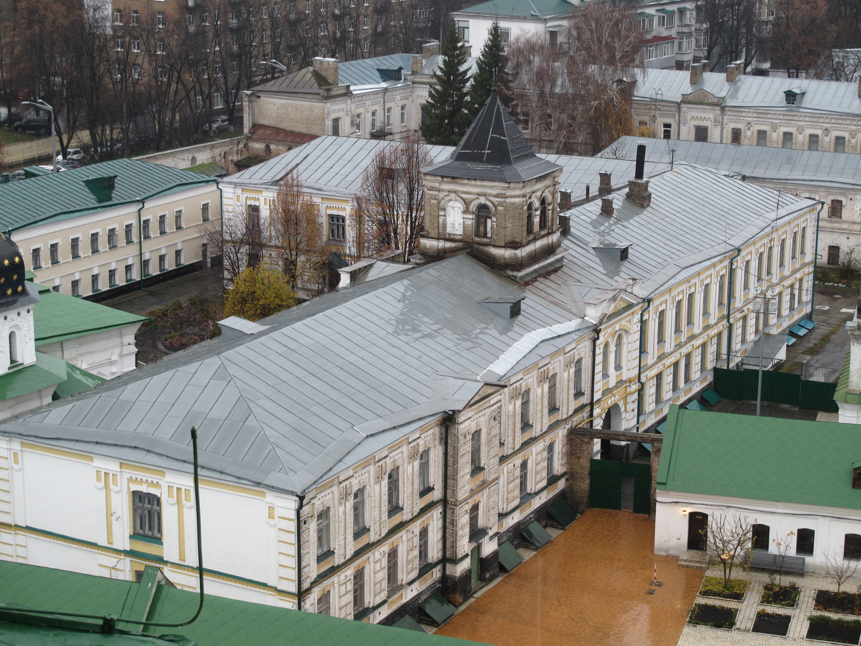 Historical Library in Kyiv